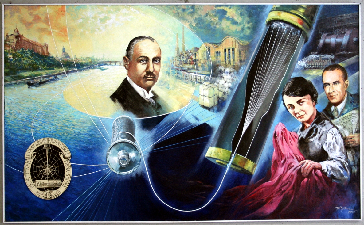 Die Stifterfamilie Grunert, Gemälde von Günter Radtke 2002 im Besitz der Hochschule Mittweida